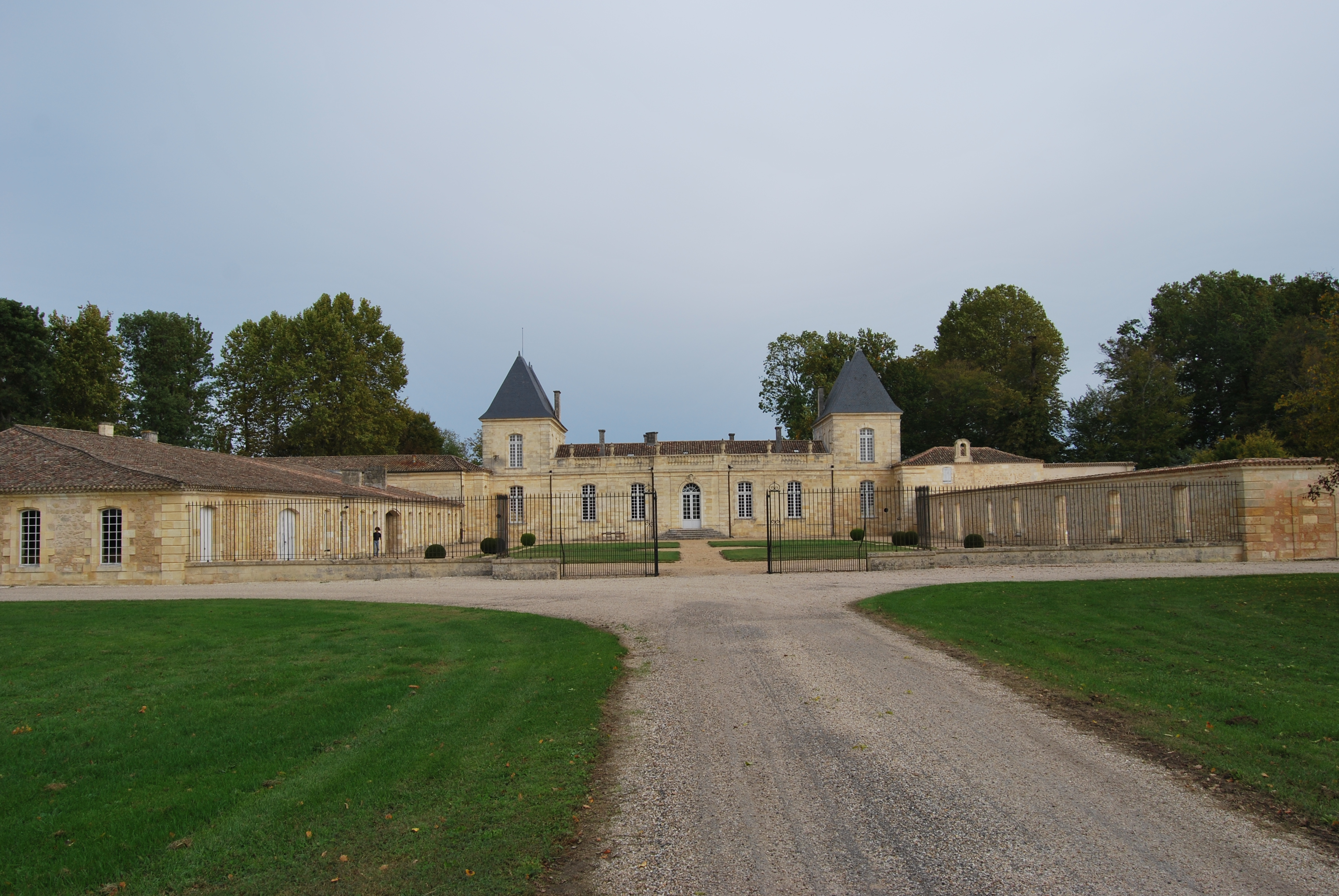 Château d'Anglade à Izon (Gironde